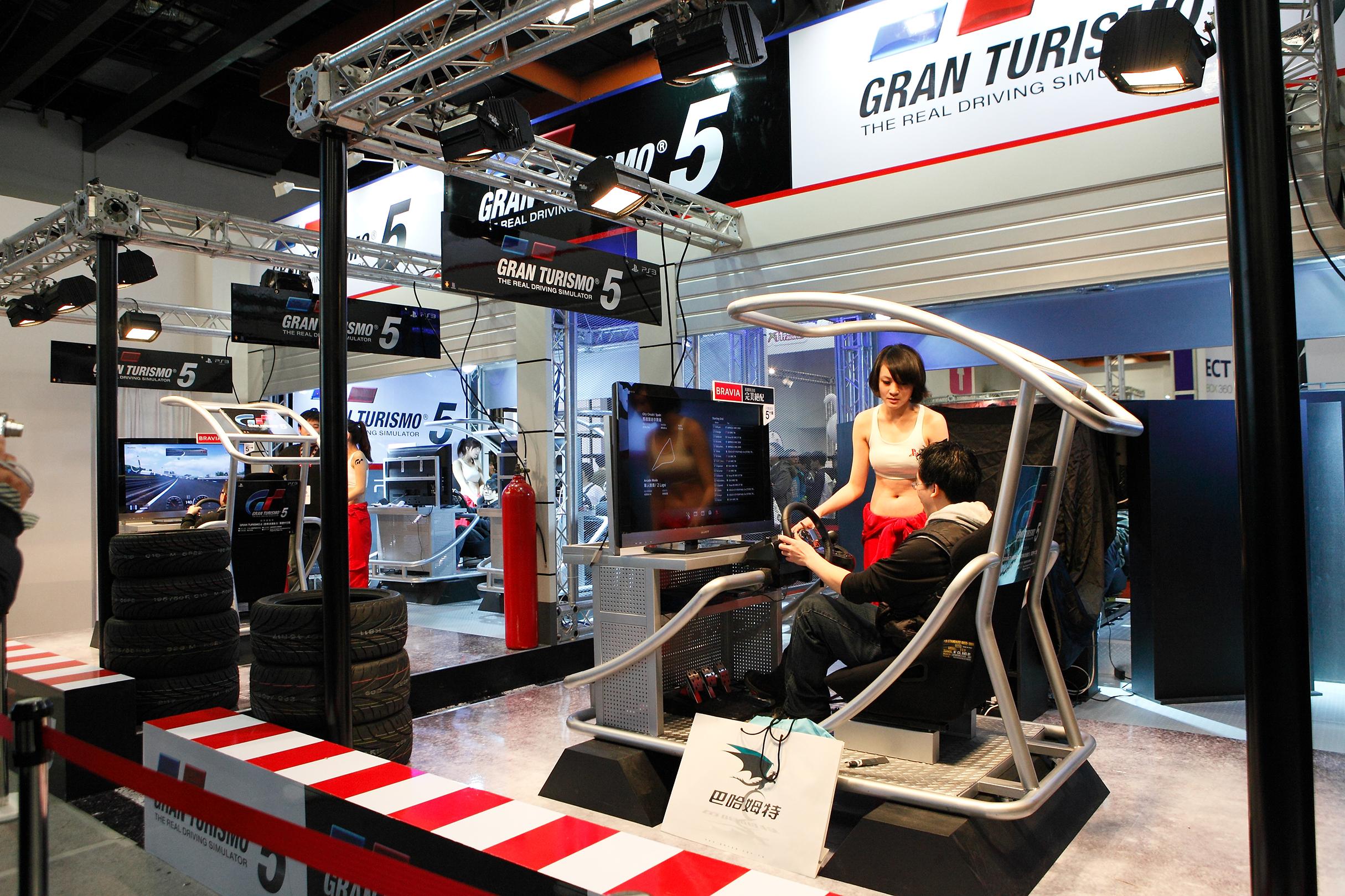 2011年台北國際電玩展，台灣索尼電腦娛樂攤位《跑車浪漫旅5》試玩區，使用索尼Bravia液晶電視。